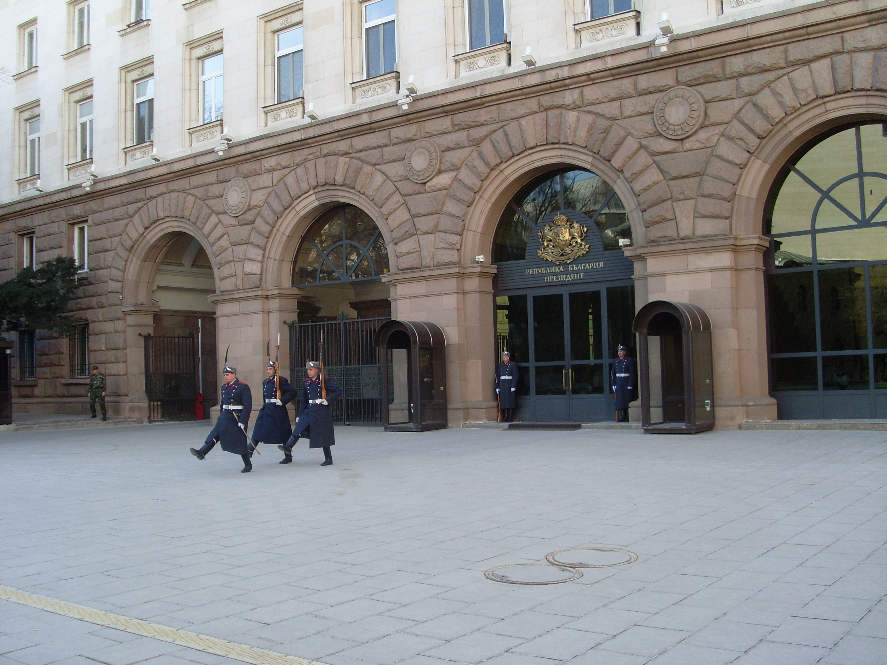 Cambio de Guardia V, Sofia, Bulgaria, marzo de 2011